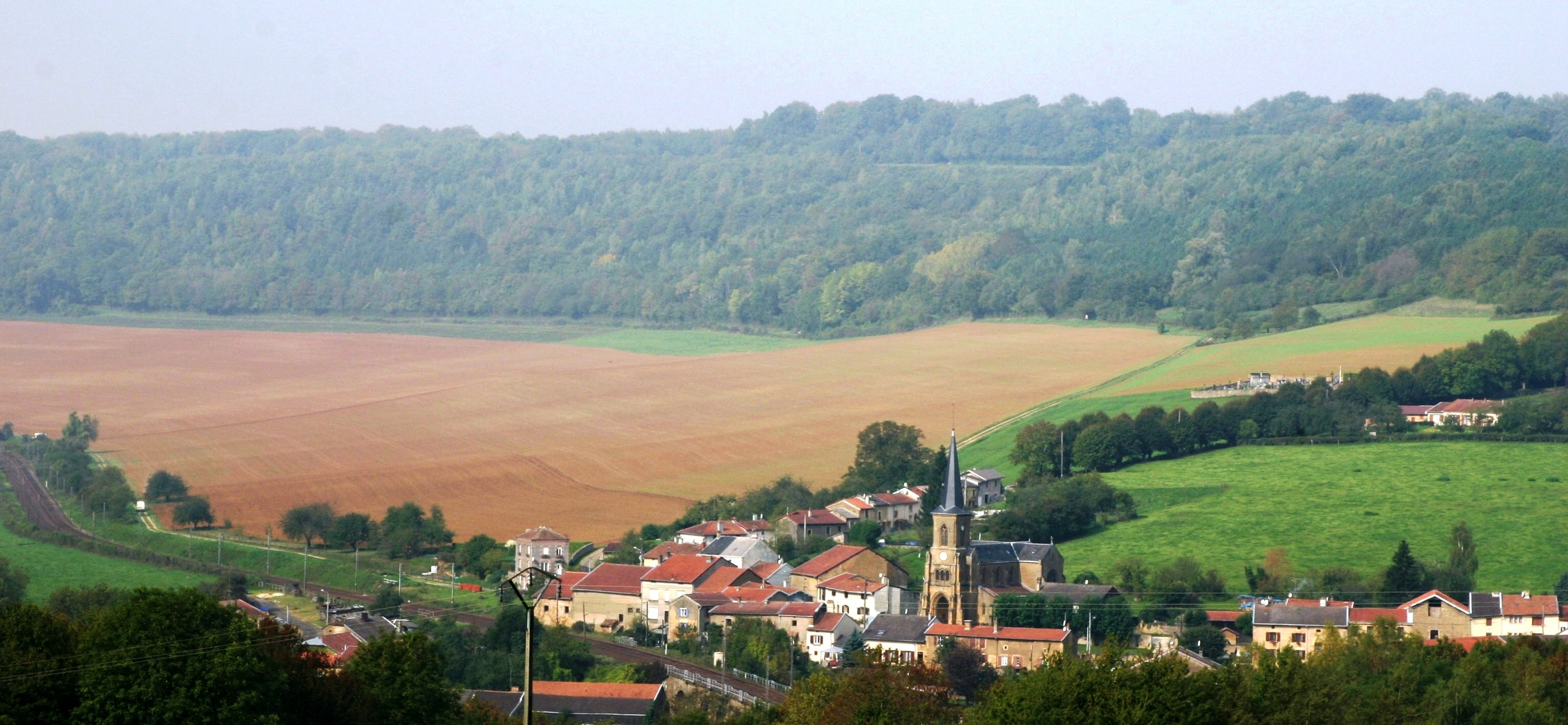 Thonne-les-Près vun der Kopp vu Montmédy aus gesinn. Kategorie:Departement Meuse.